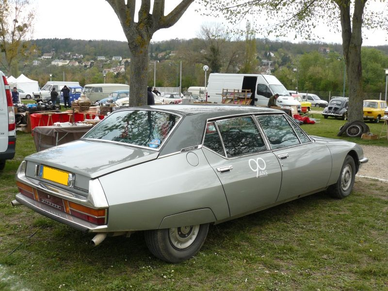 Mantes la Jolie 2012